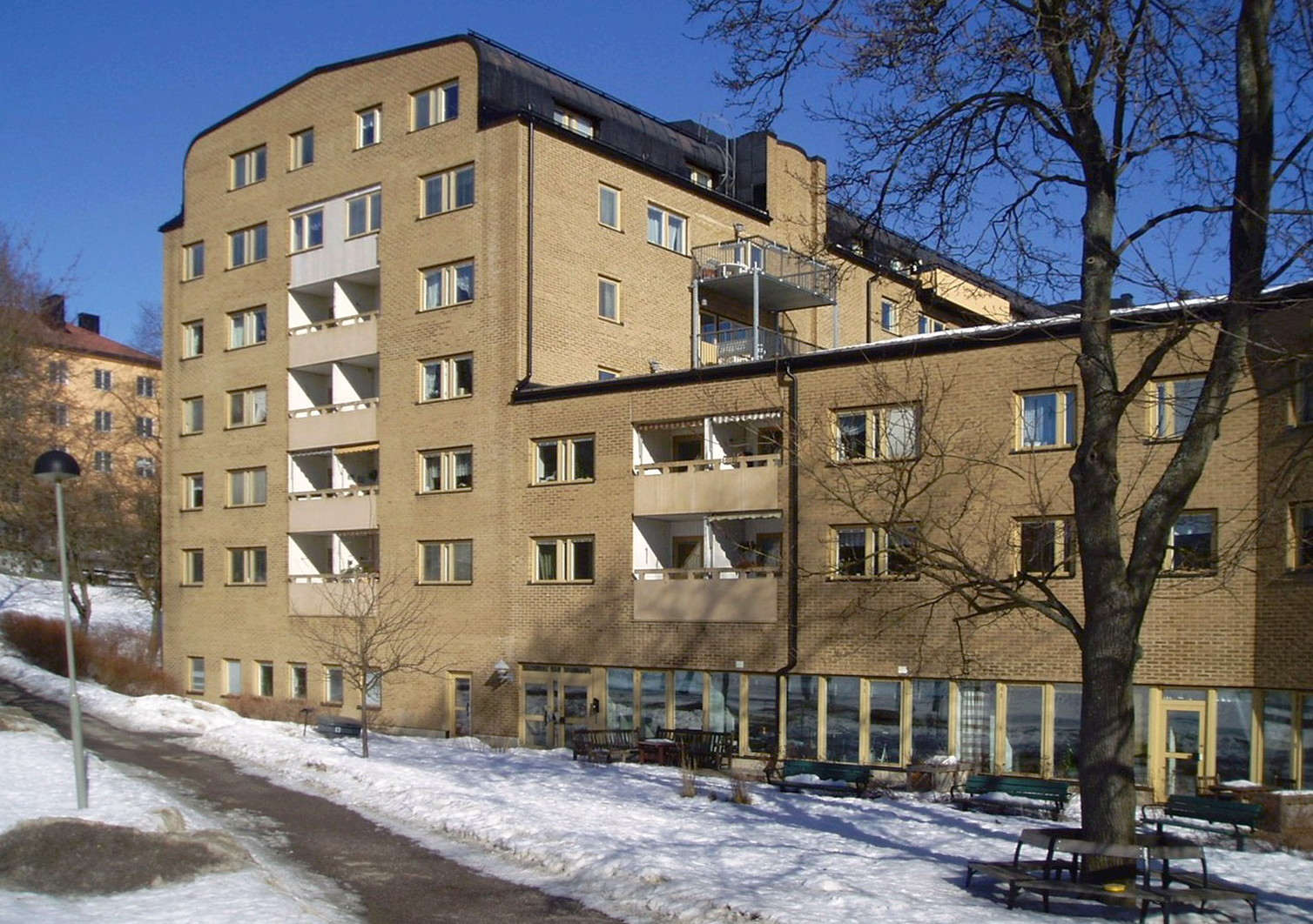 Kvarteret Hamnvakten, Södermalm, Stockholm. Vintertullens servicehus, uppfört 1982.